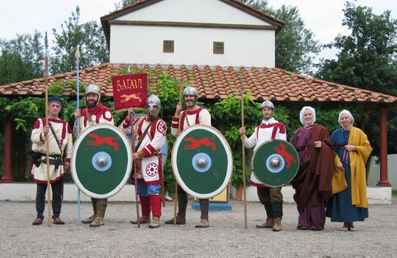 gruppo di rievocazione storica degi Batavi iuniores